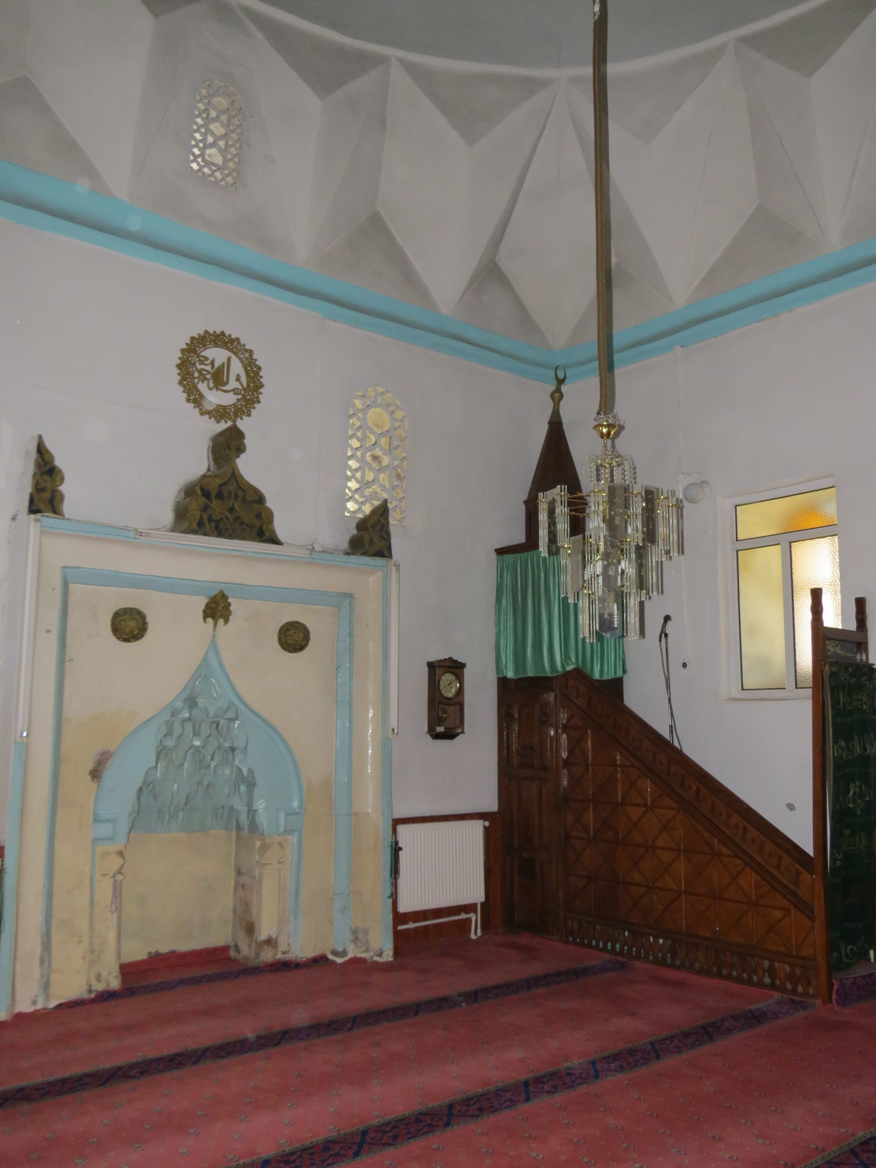 kütahya arslan bey cami içi